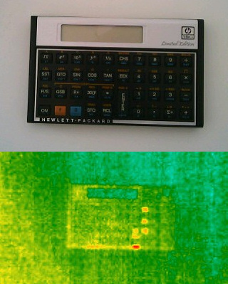 Infrarotaufnahme eines Taschenrechners, nachdem die Ziffern 1258 gedrückt wurden.